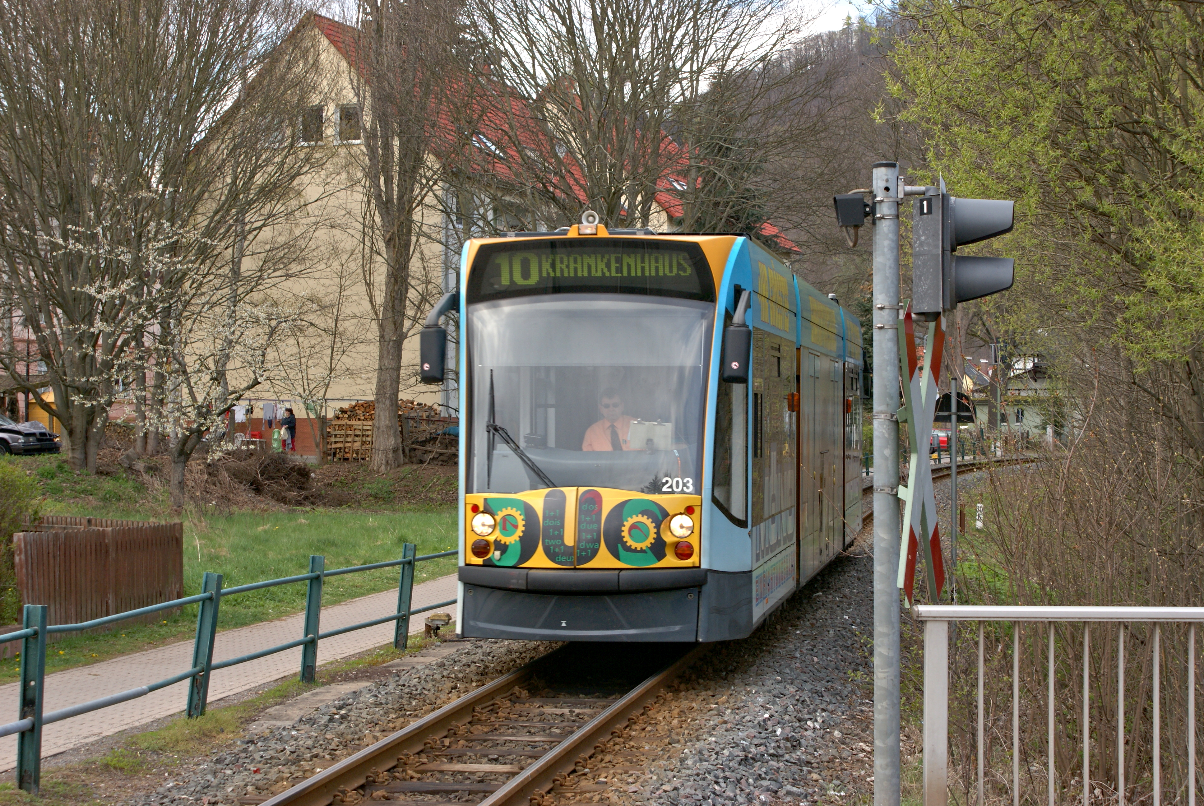 Siemens Combino Duo 187 203 (Tw 203 der SWN) Bo´Bo´ Siemens 2004 in Ilfeld am 23. April 2012